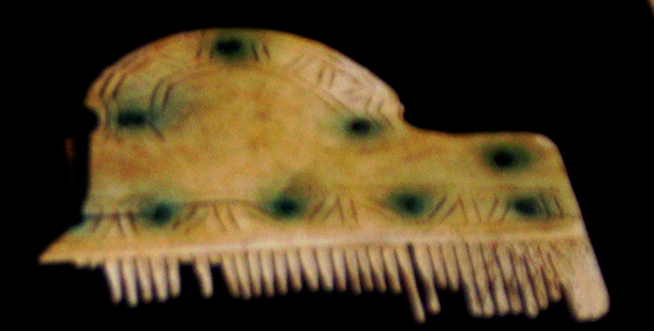 Peine de hueso encontrado en Castro Bergidum (El Bierzo, León, España). Siglos IV-V.